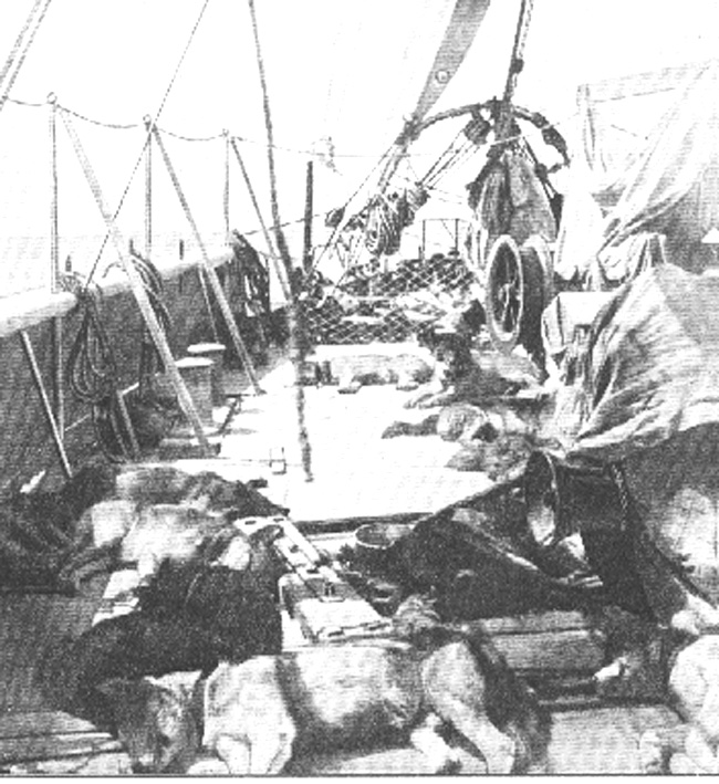 Die Hunde im Deck der Fram